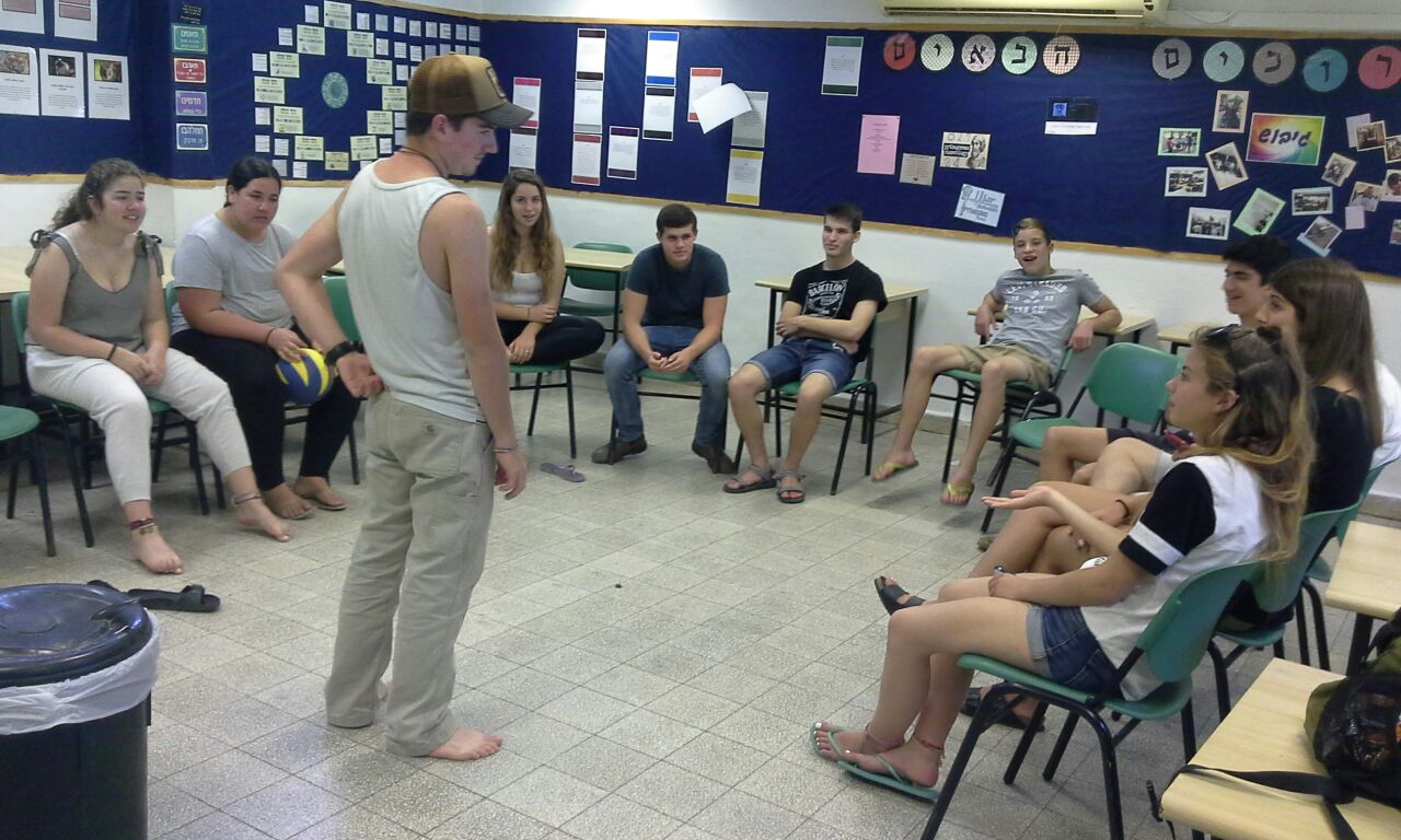 תהליך ההכנה של קבוצת י' לקראת שנת ההובלה